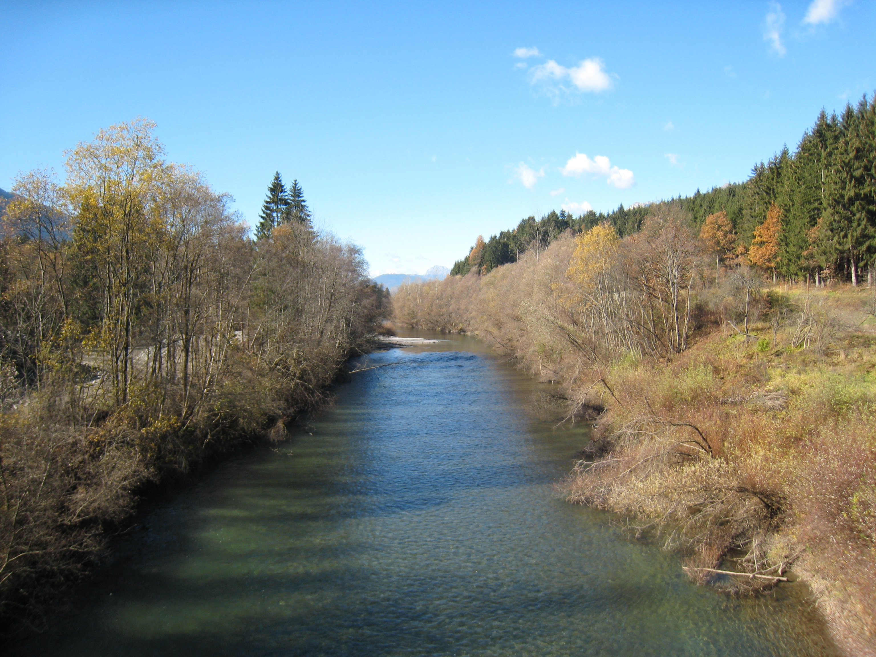 Gail bei Vorderberg, Blick gegen Westen